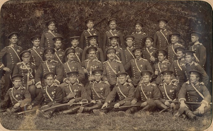 Войници от Втори конен полк в Лом.